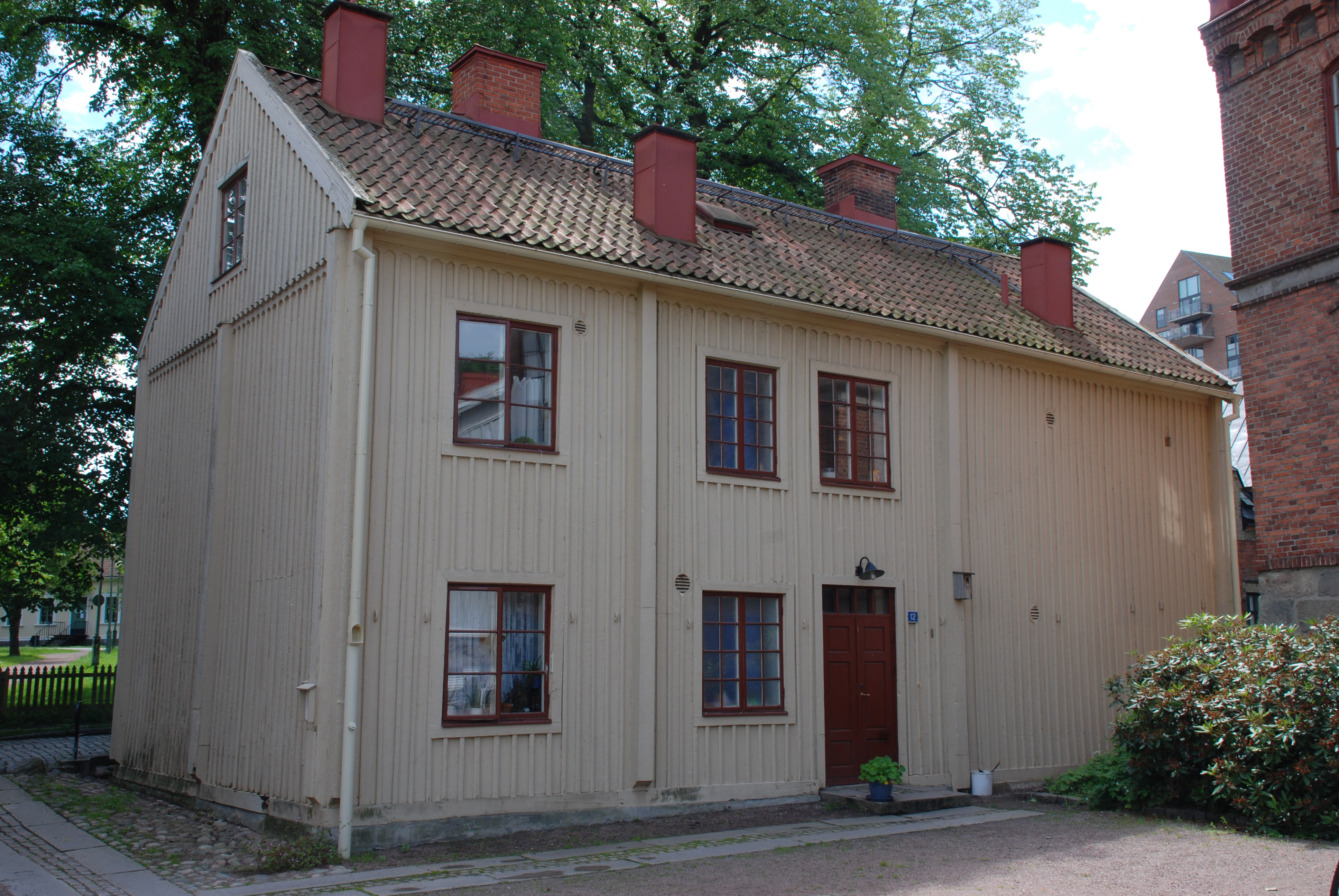 Klippans kulturreservat i stadsdelen Majorna i Göteborg. Klippans värdshus uppfördes 1762 och är känt för att det är omnämnt av Jacob Wallenberg i hans bok "Min son på galejan". (Klippan 12)